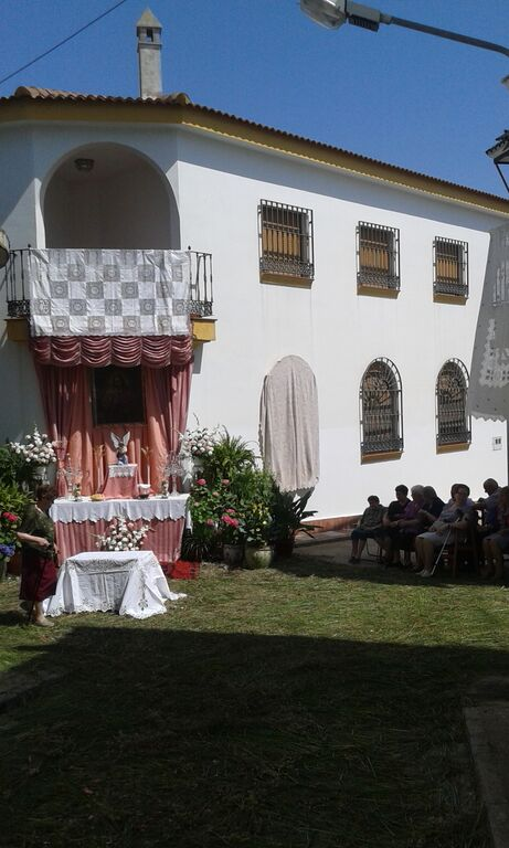 Herrera, Kristokorpo